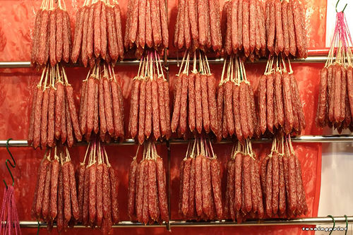 Chinese sausage unpackaged